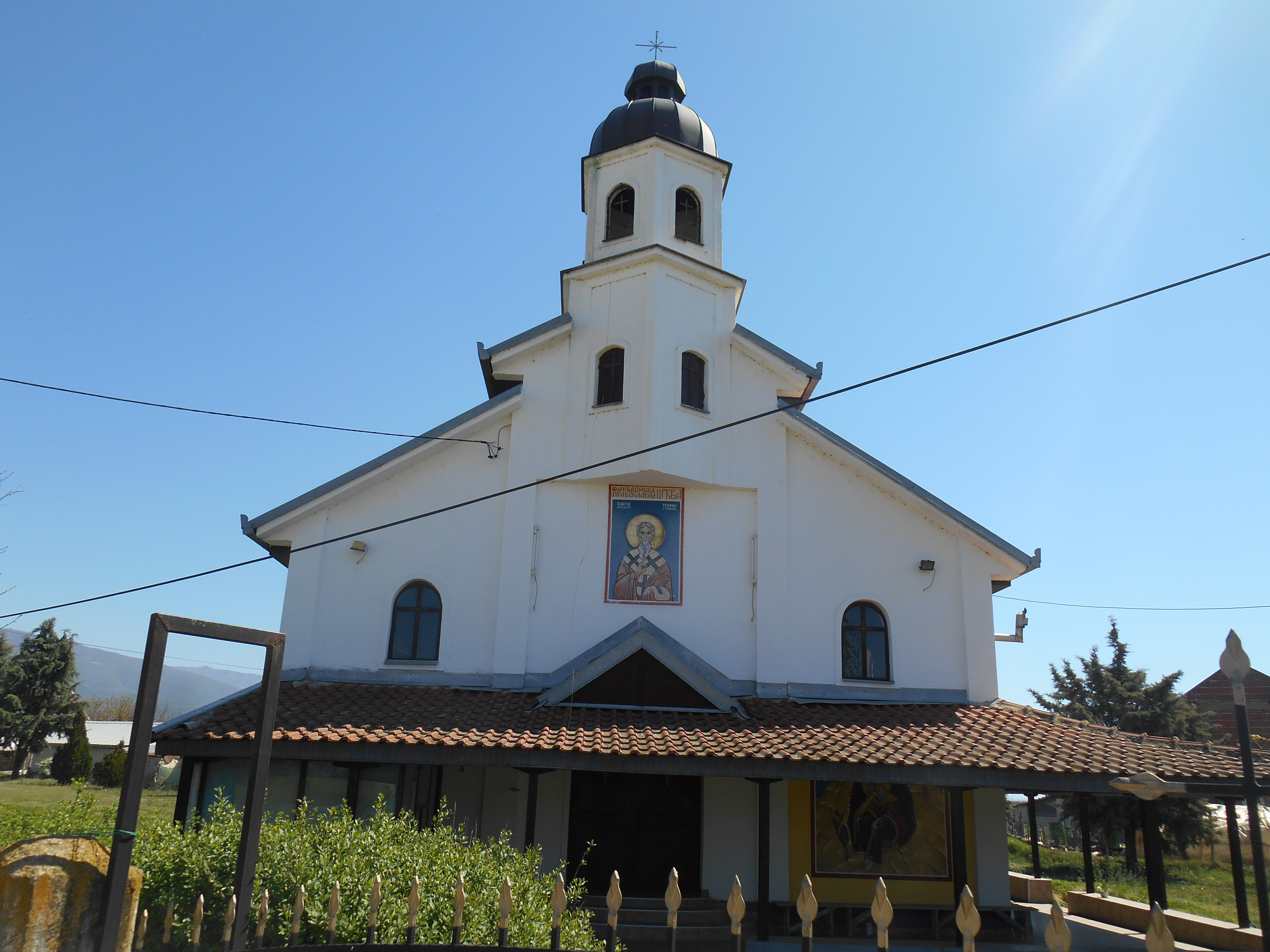 Црква „Св. Теофил Струмички“ - Гечерлија